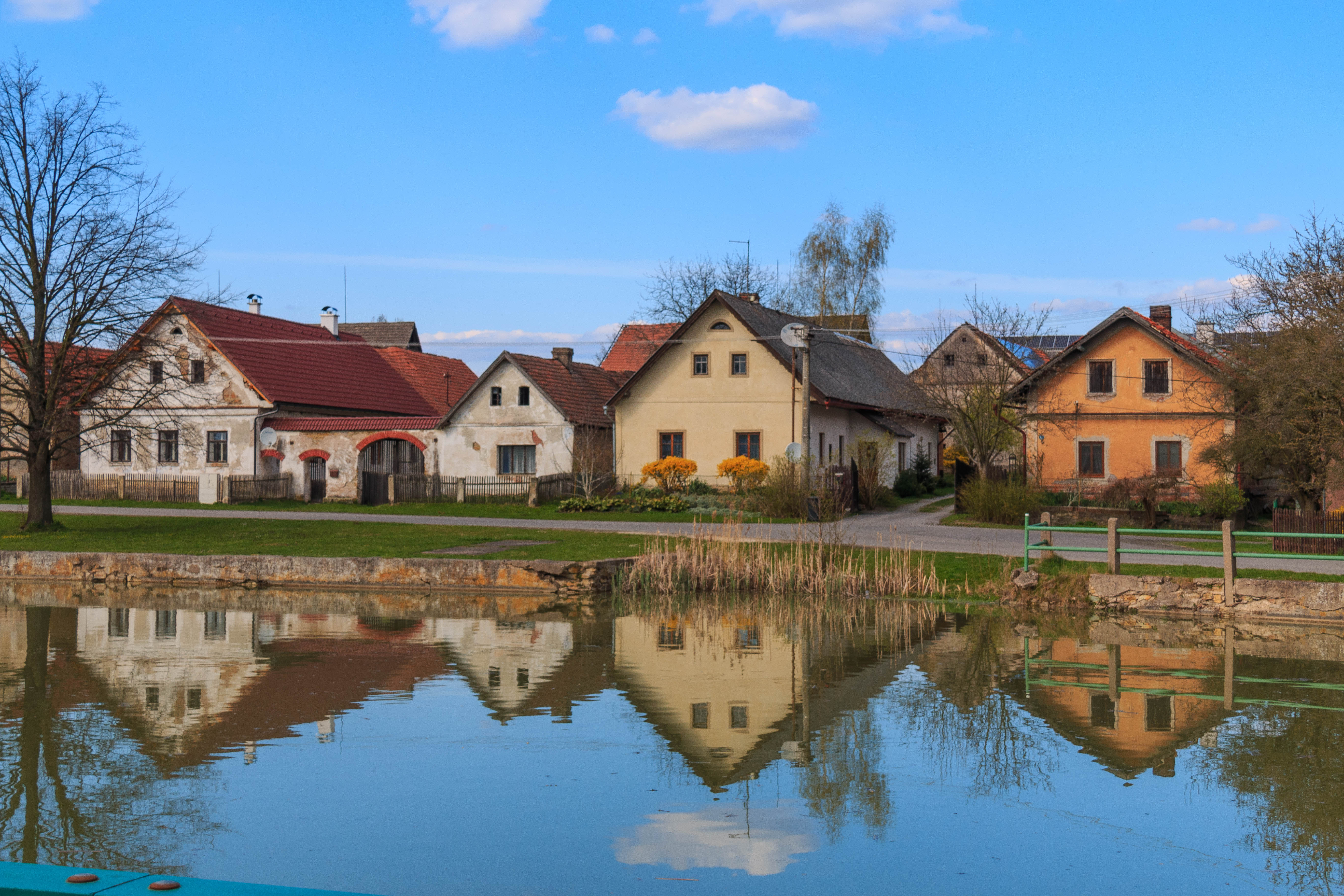 Provodov rybník